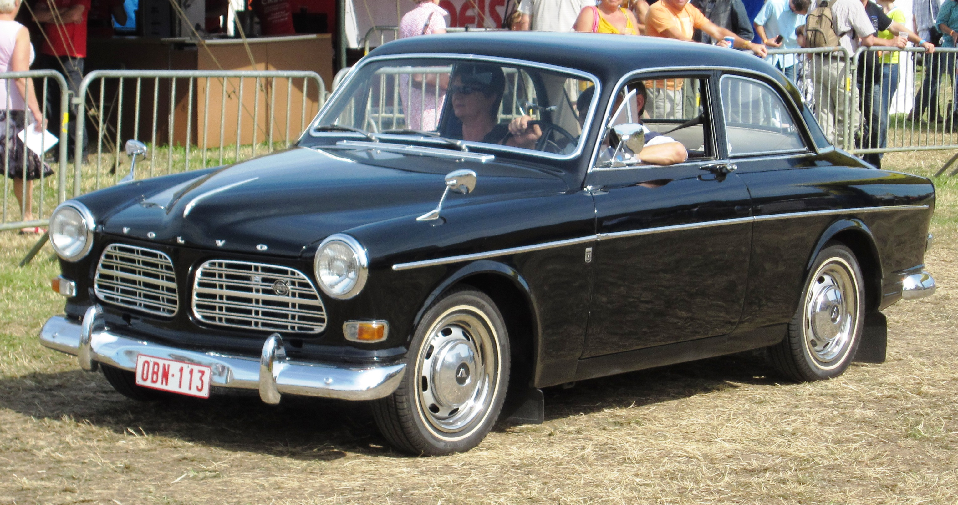 Volve 121 vers 1965